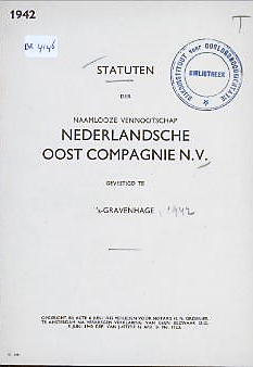 Nederlandsche Oost Compagnie Statuten Titelseite Scan Geheugen van Nederland